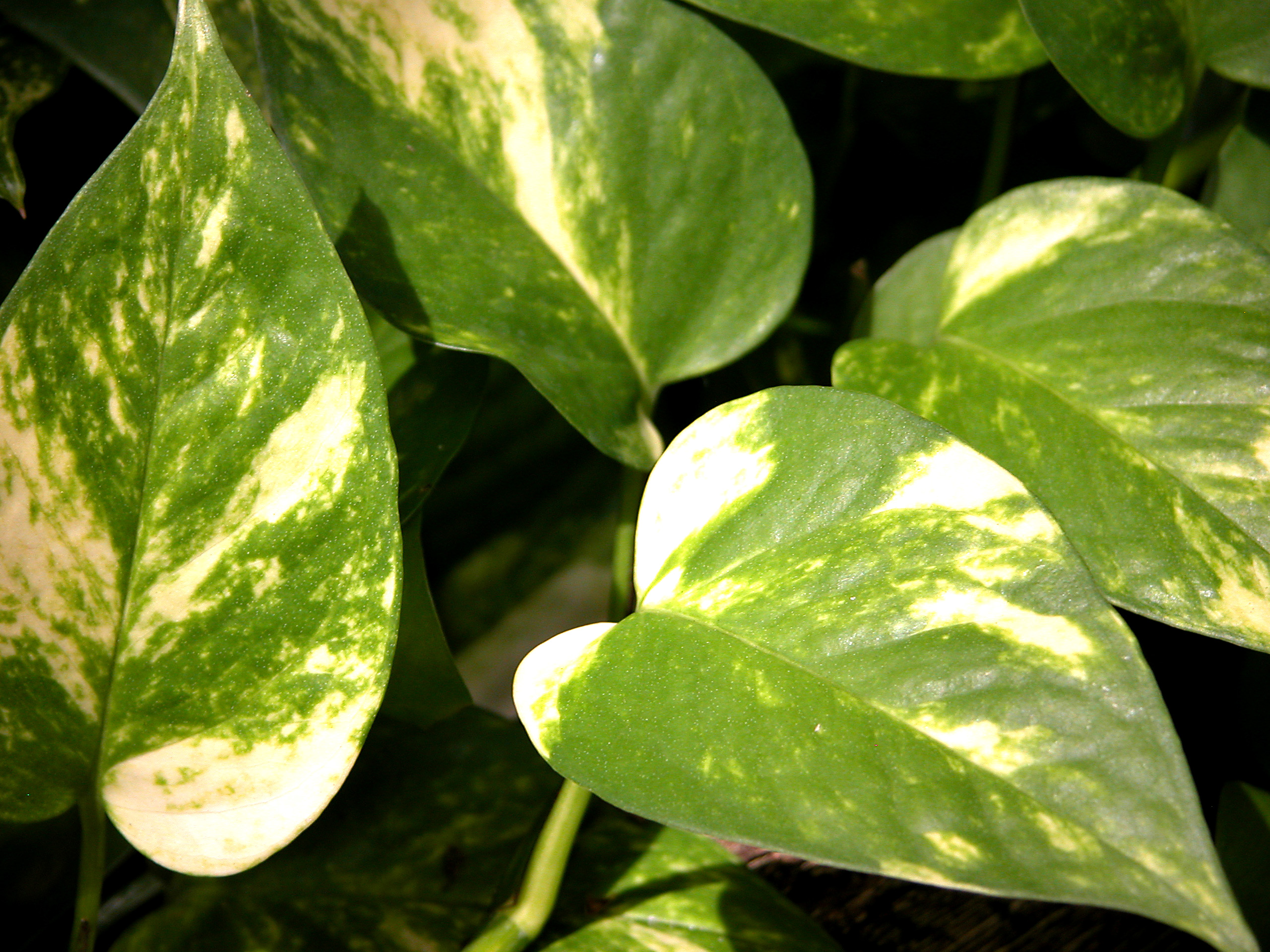 Epipremnum aureum